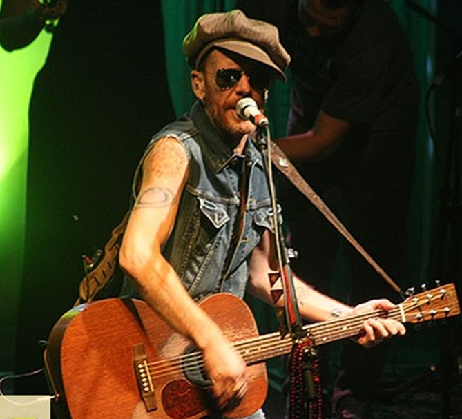 José Fernando "Nando" Gomes dos Reis (São Paulo, 12 de janeiro de 1963), é um baixista, cantor, violonista e compositor brasileiro. Ex-baixista da banda de rock Titãs, atualmente segue em carreira solo, acompanhado pela banda Os Infernais.